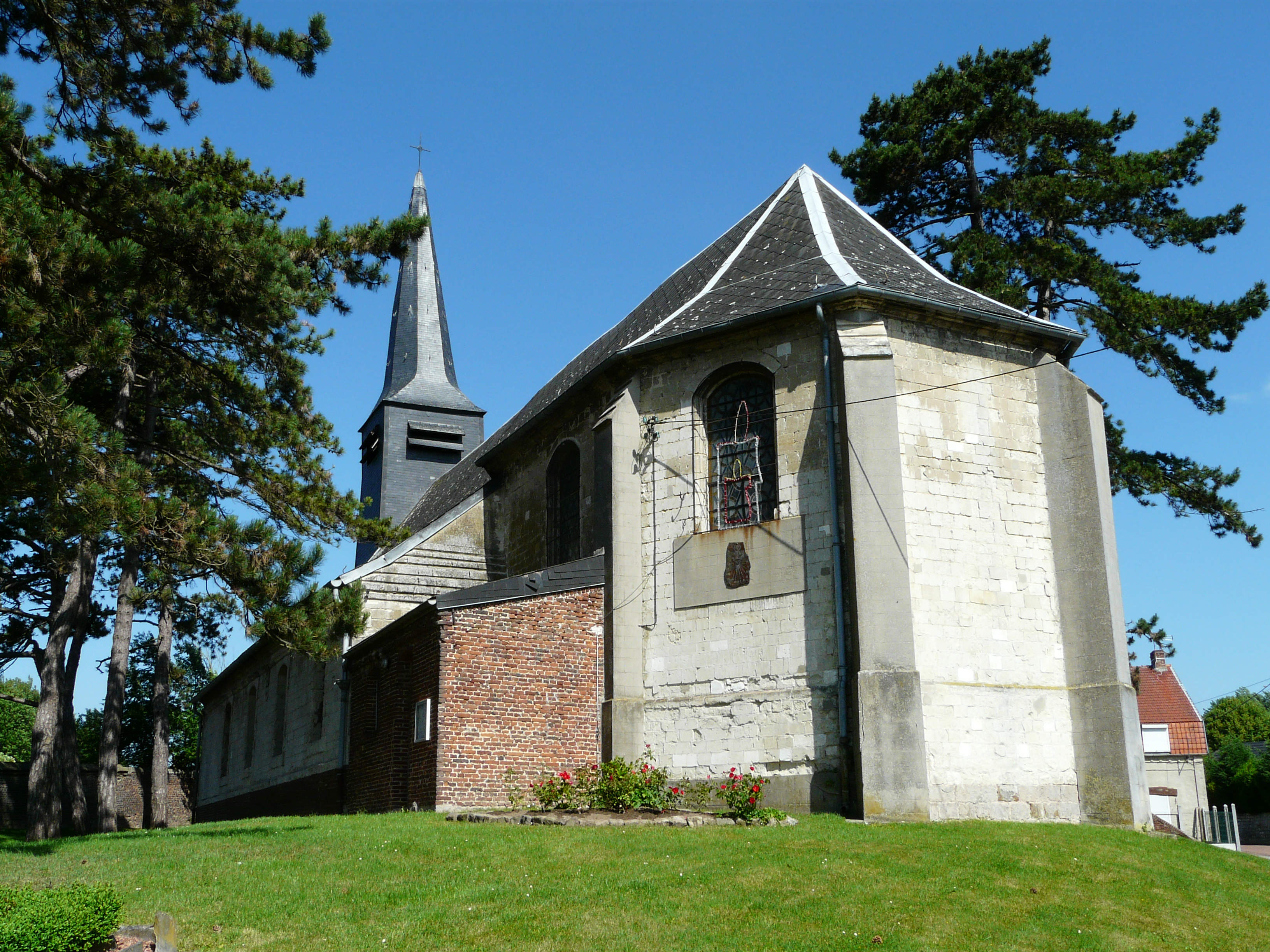 Eglise de Thun-L'Evêque (Nord, France)